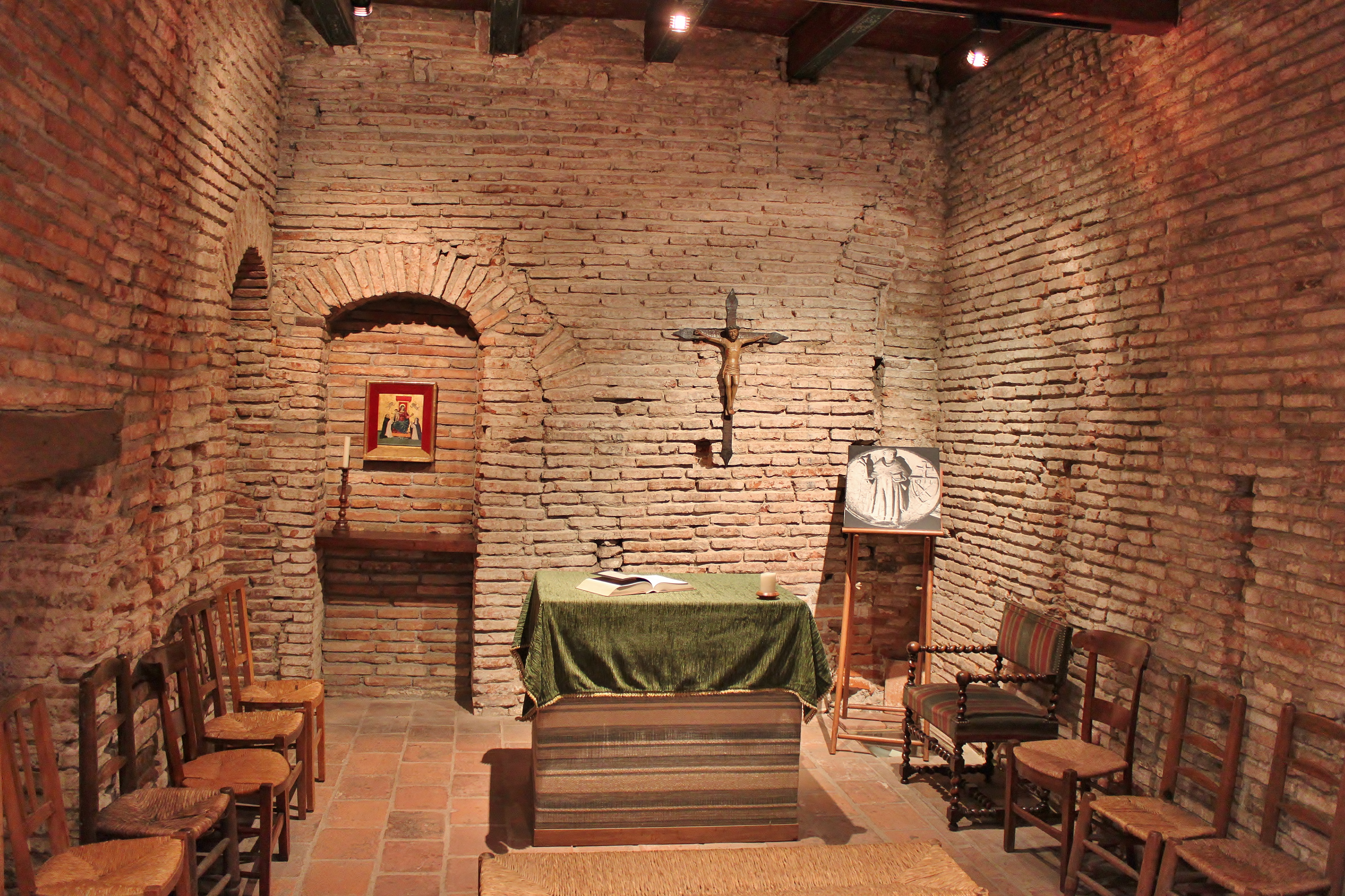 La chambre de Saint Dominique (maison Seilhan), Toulouse, France